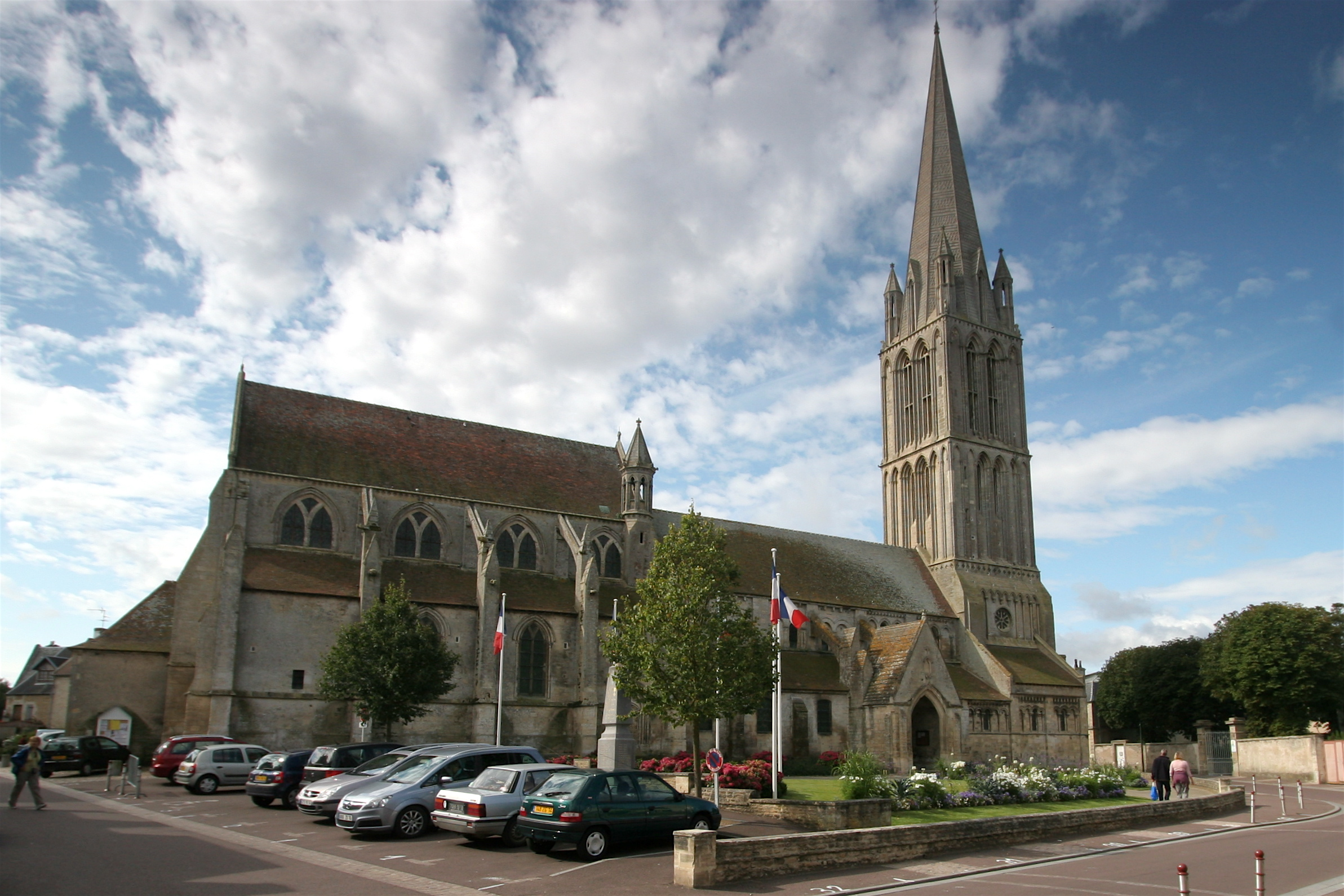 Église Notre-Dame-de-la-Nativité de Bernières-sur-Mer (Calvados, France), classée monument historique depuis 1840.